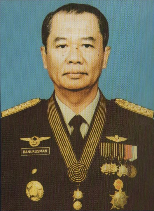 Jenderal Polisi Banurusman Astrosemitro. Kepala Kepolisian Negara Republik Indonesia